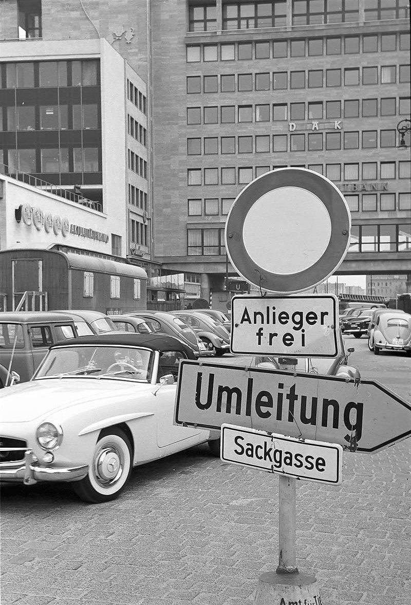 Blick in die Kantstraße auf das Schimmelpfeng-Haus in Berlin-Charlottenburg.